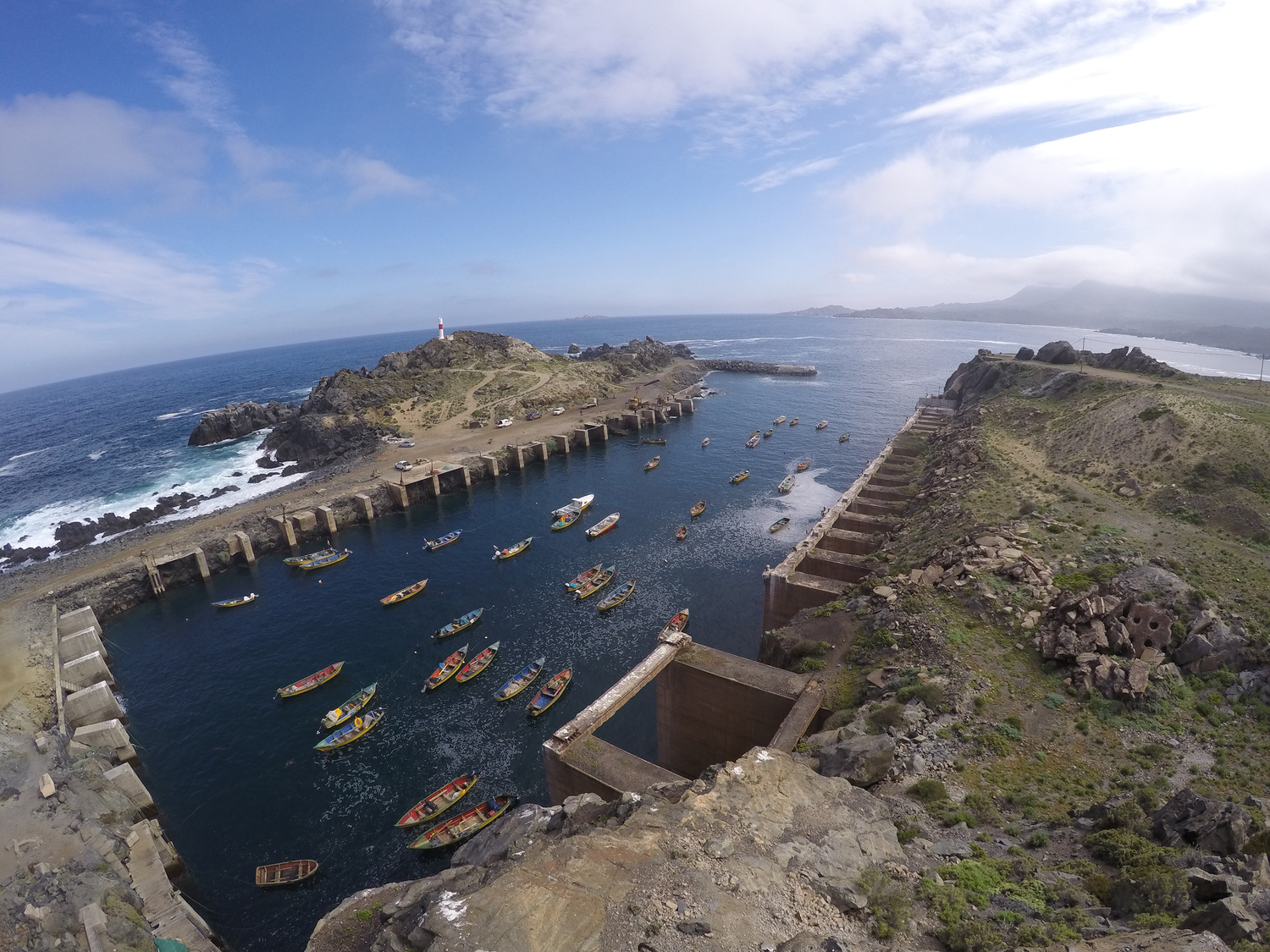 Darsena Cruz Grande